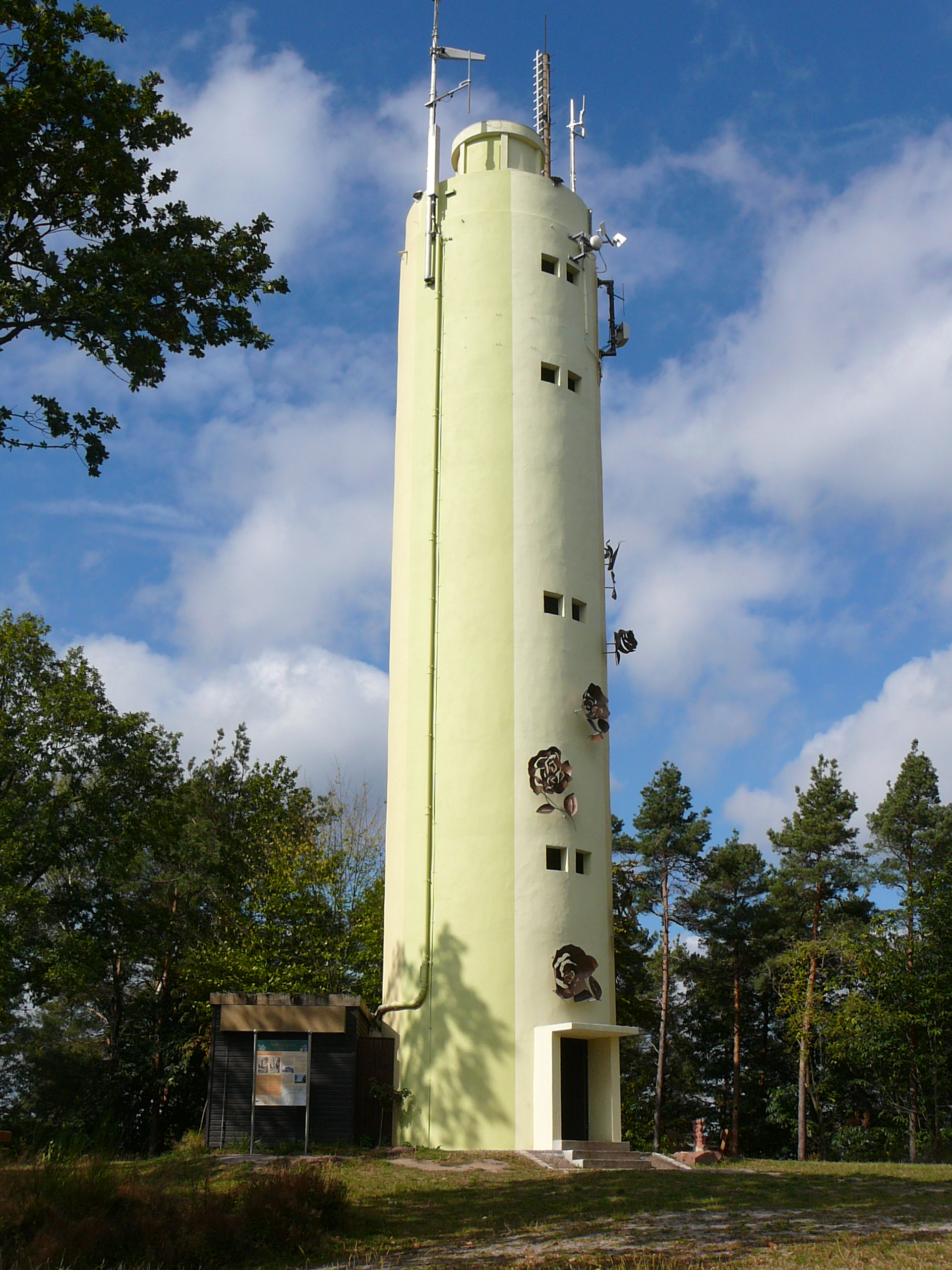 Aussichtsturm auf dem Stäffelsberg